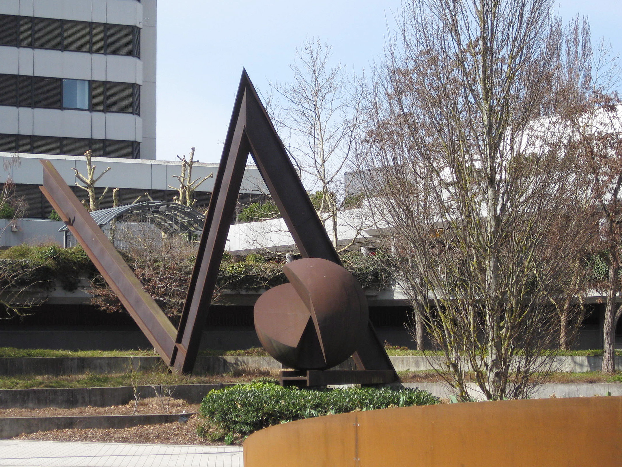 Hans Dieter Bohnet, Großplastik, 1985, Straßenböschung bei der Kreissparkasse, Böblingen, Deutschland